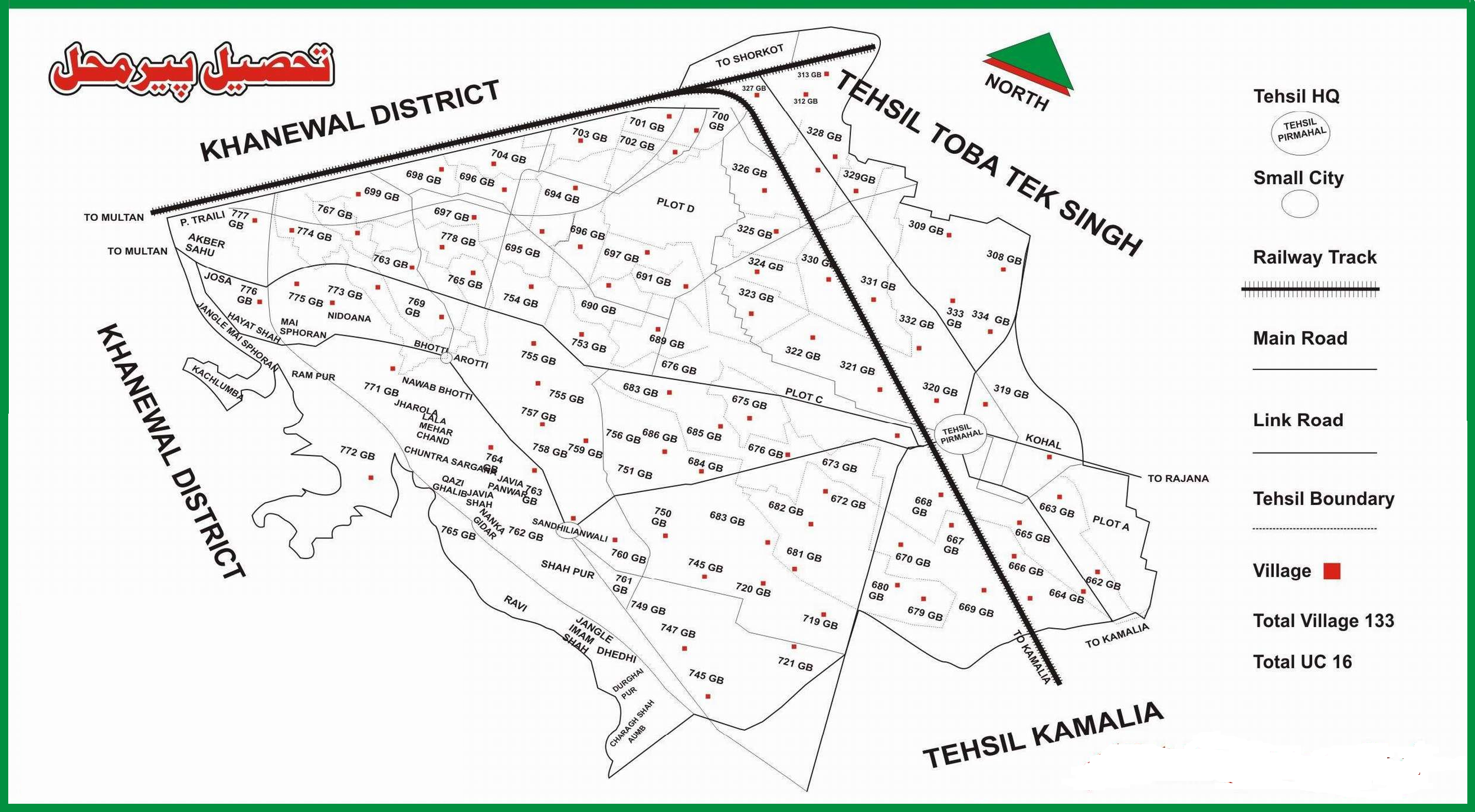 پنجابی: تحصیل پیرمحل دے پنڈاں دا نقشہ